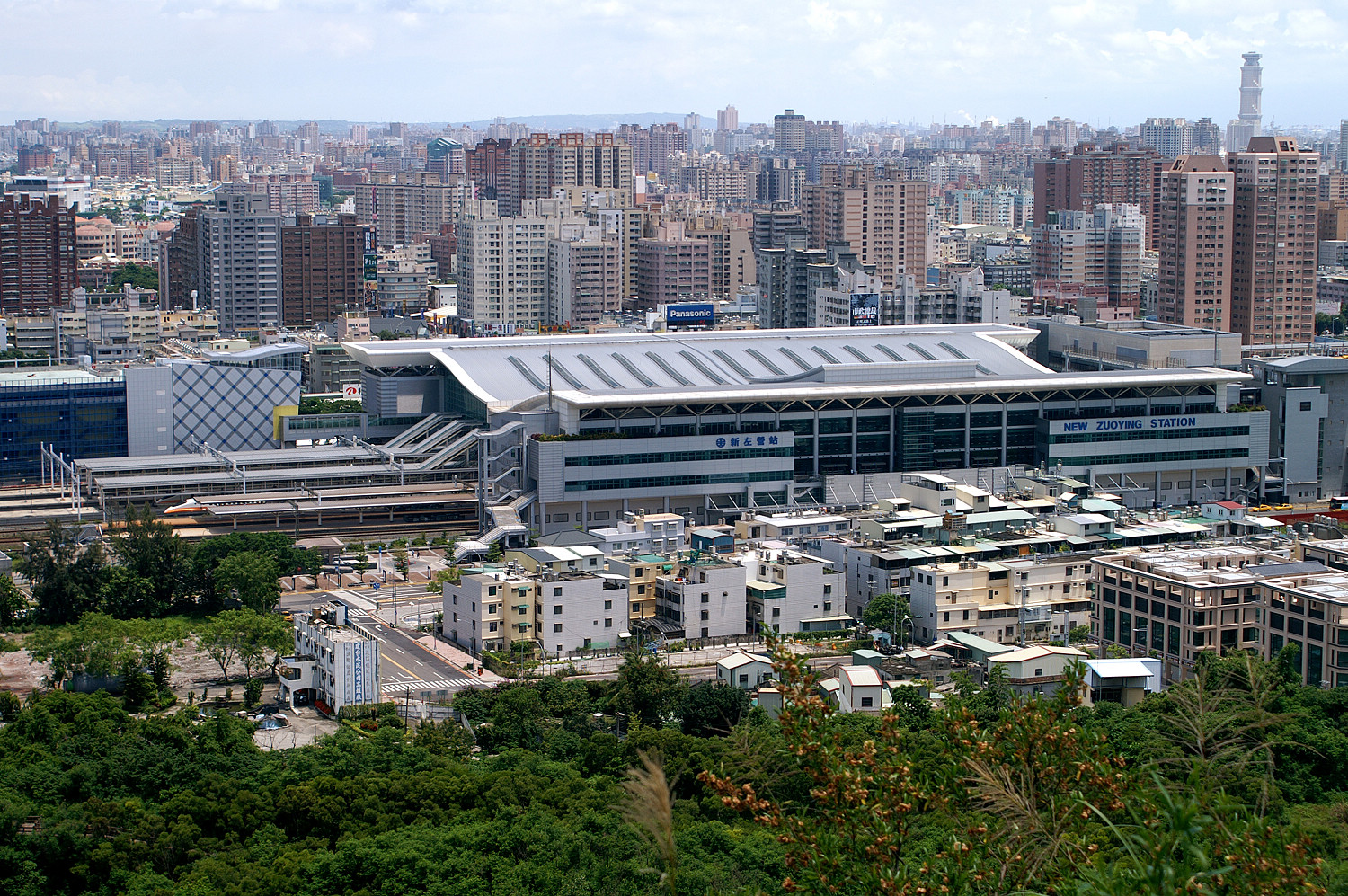 俯瞰高鐵左營站與台鐵新左營站